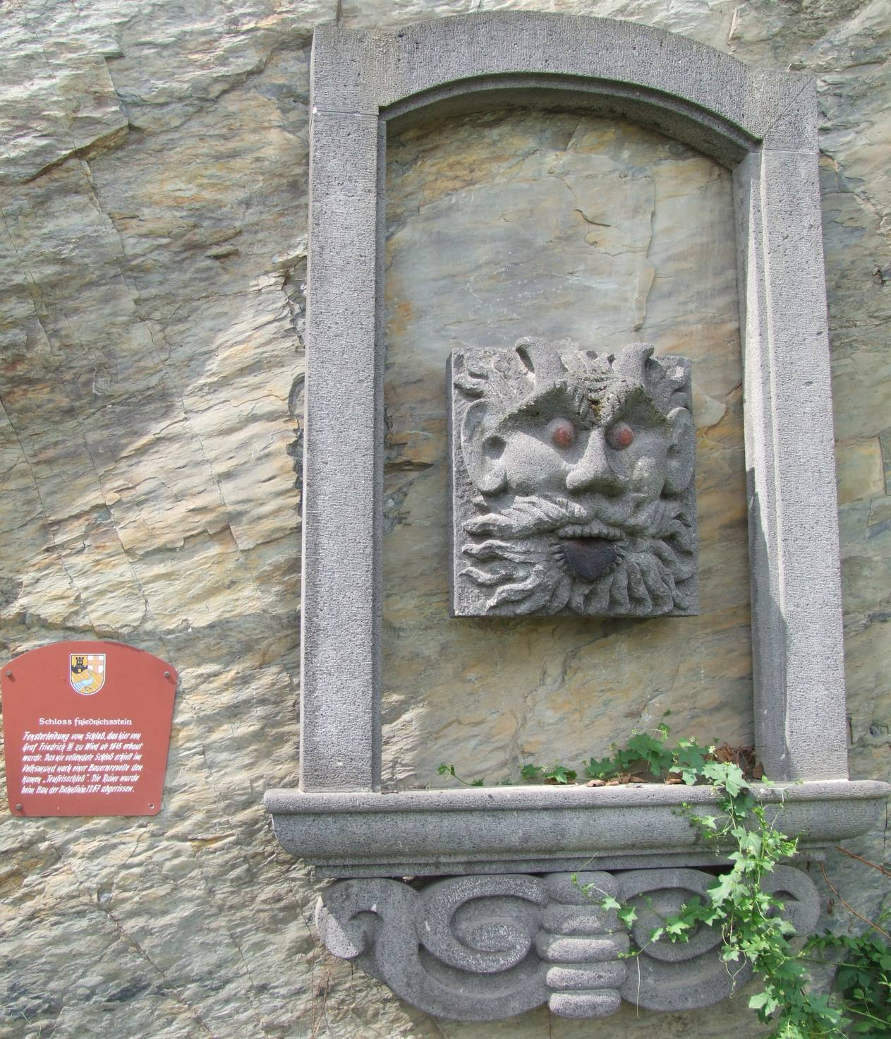 Fenster von Schloss Friedrich(s)stein in Neuwied